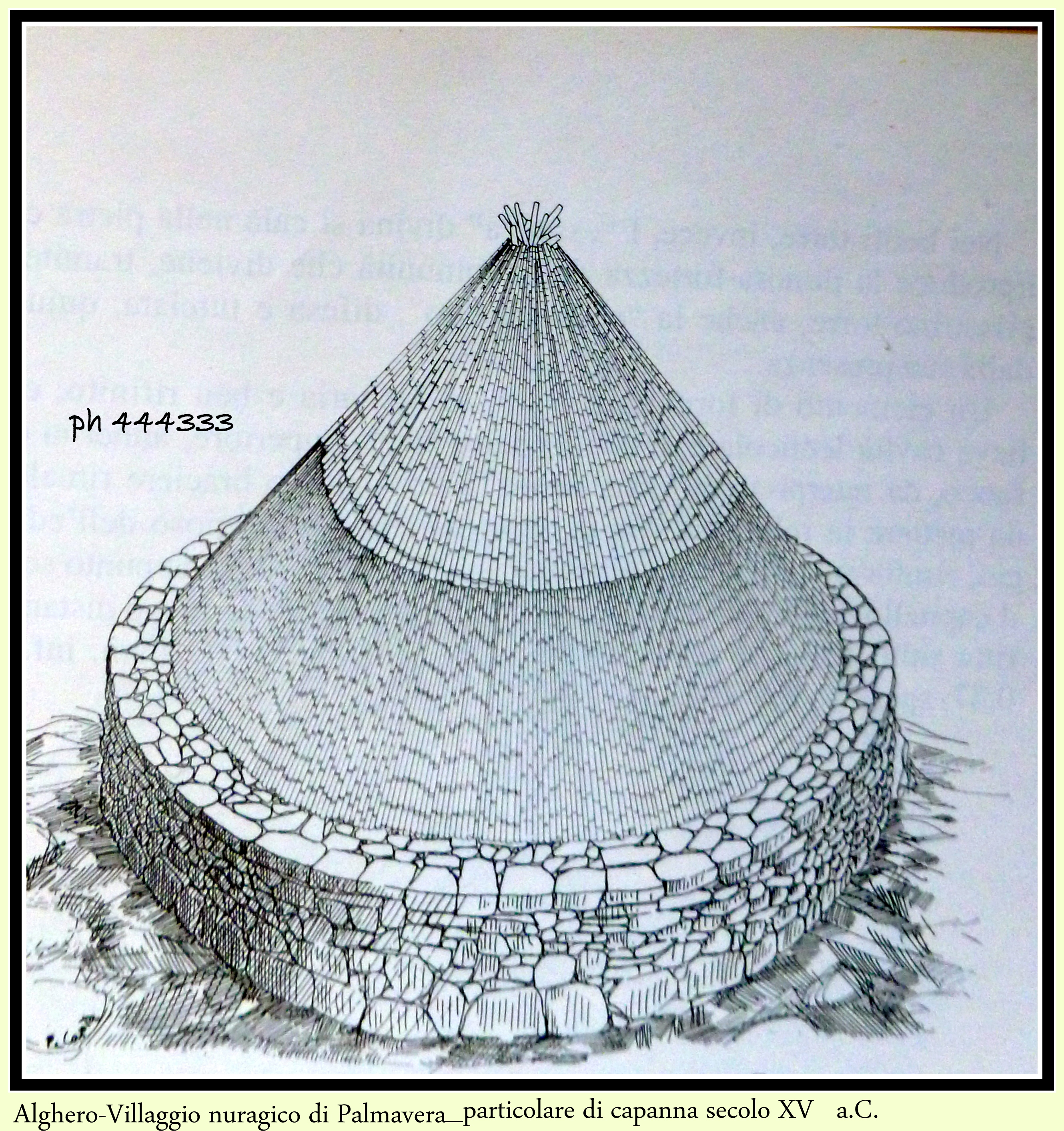 Sardegna,Alghero